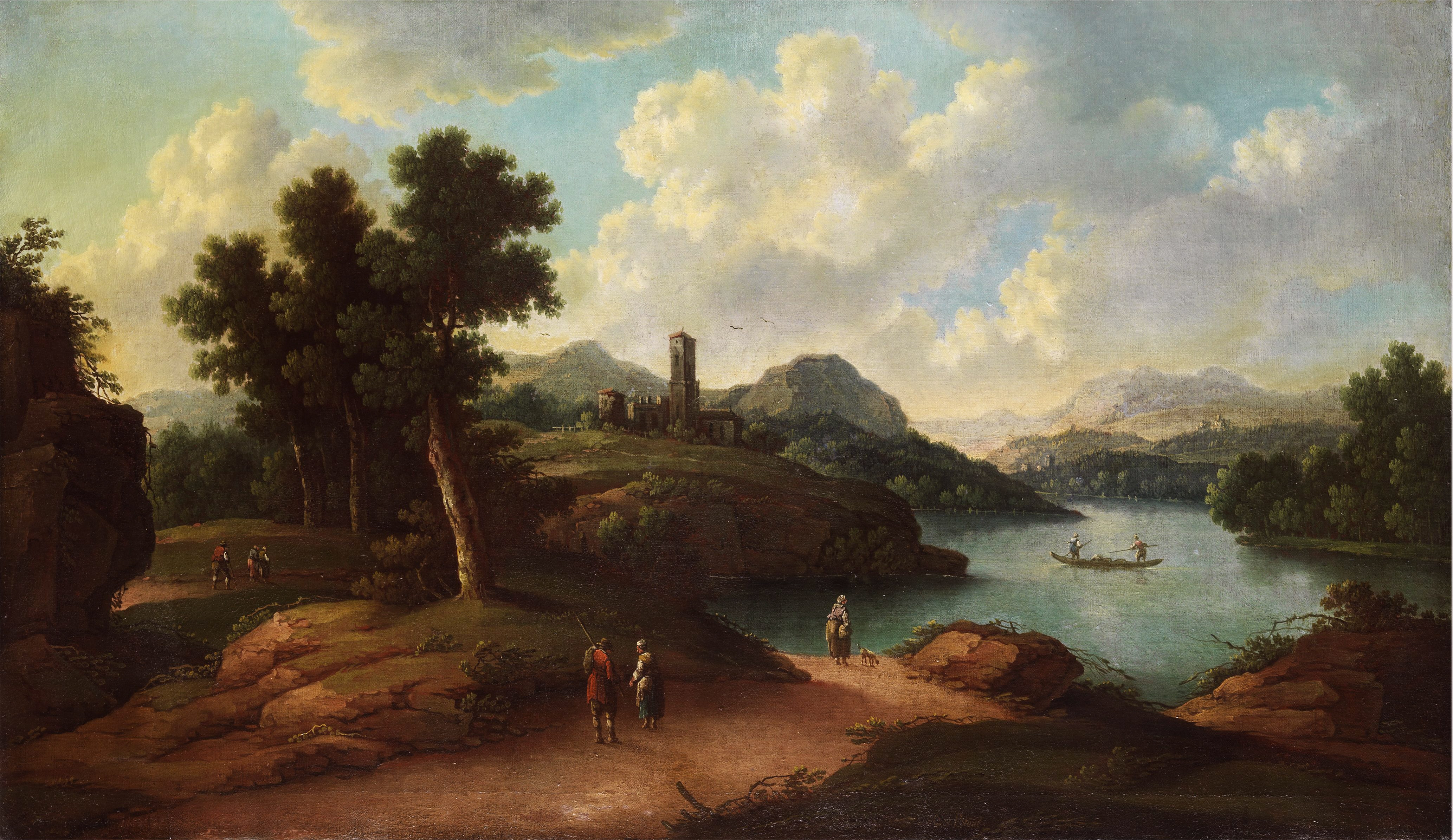 Italienische Landschaft mit See, felsigen Ufern und Gebäuden mit Campanile. Öl auf Leinwand. 77 x 133 cm. Rechts unten signiert.